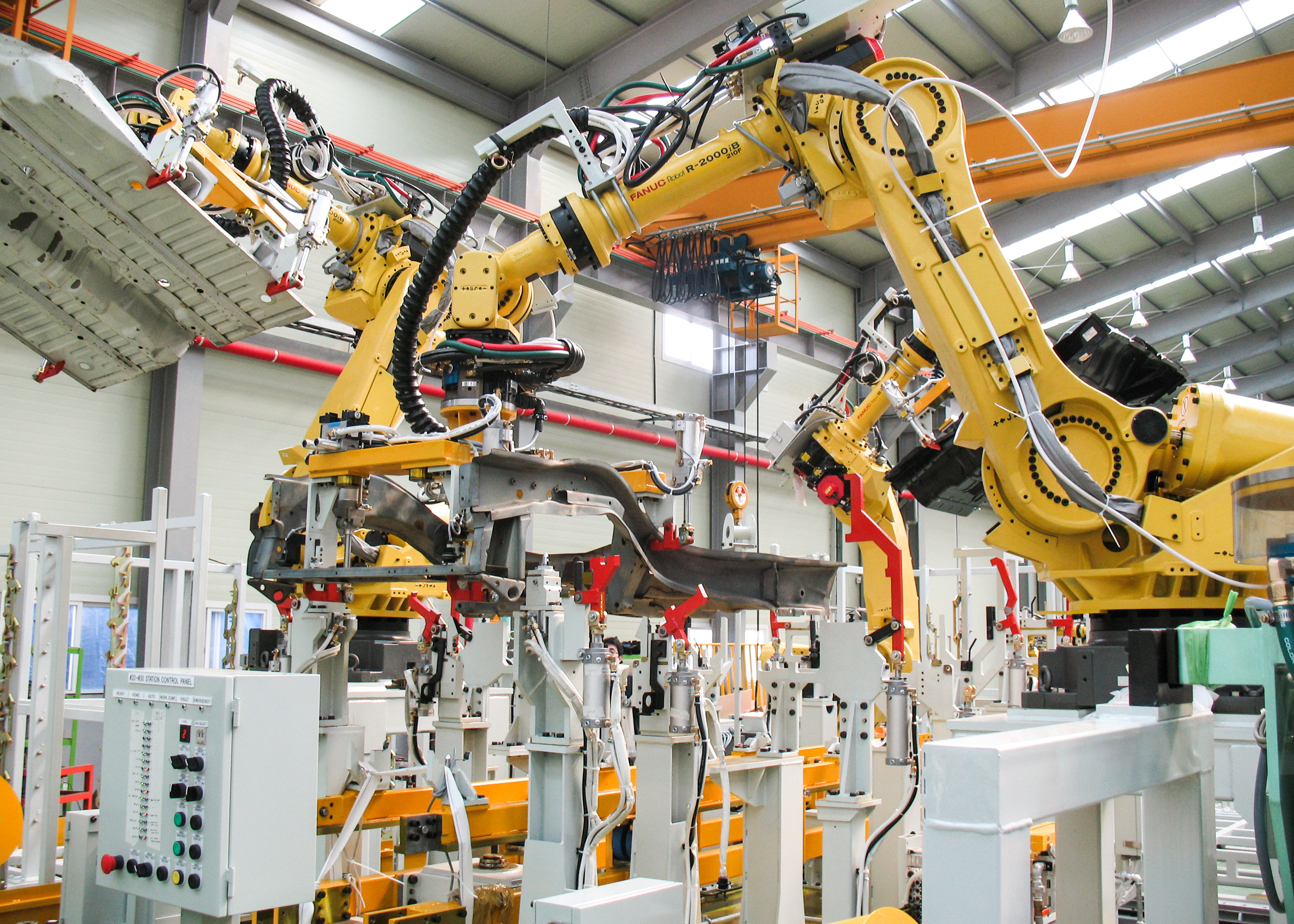 Промышленные роботы FANUC_R2000iB. В качестве рабочего инструмента - сменная инструментальная оснастка (захват). Для сварочного комплекса GM-DAT Запорожского автомобилестроительного завода.